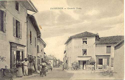 Jasseron